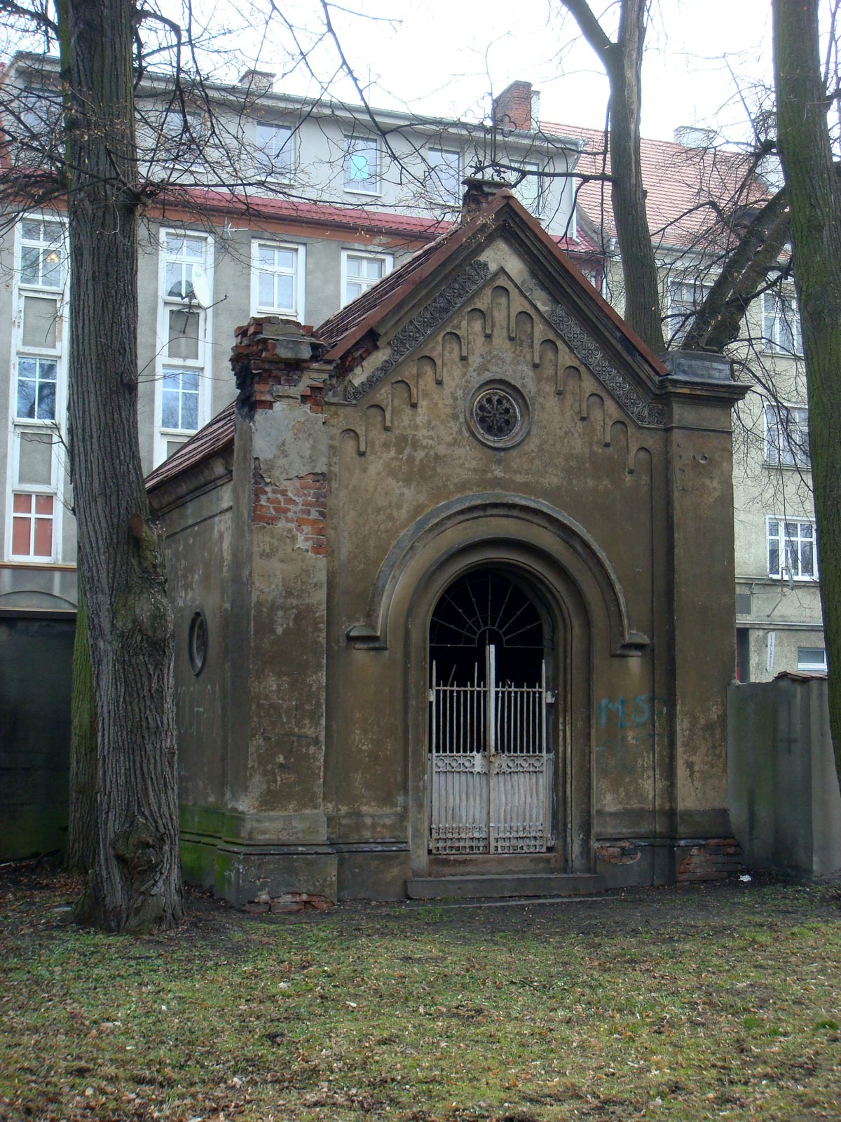 Kaplica cmentarna rodziny Beyer na cmentarzu ewangelicko-augsburskim przy ul. Wrocławskiej w Opolu